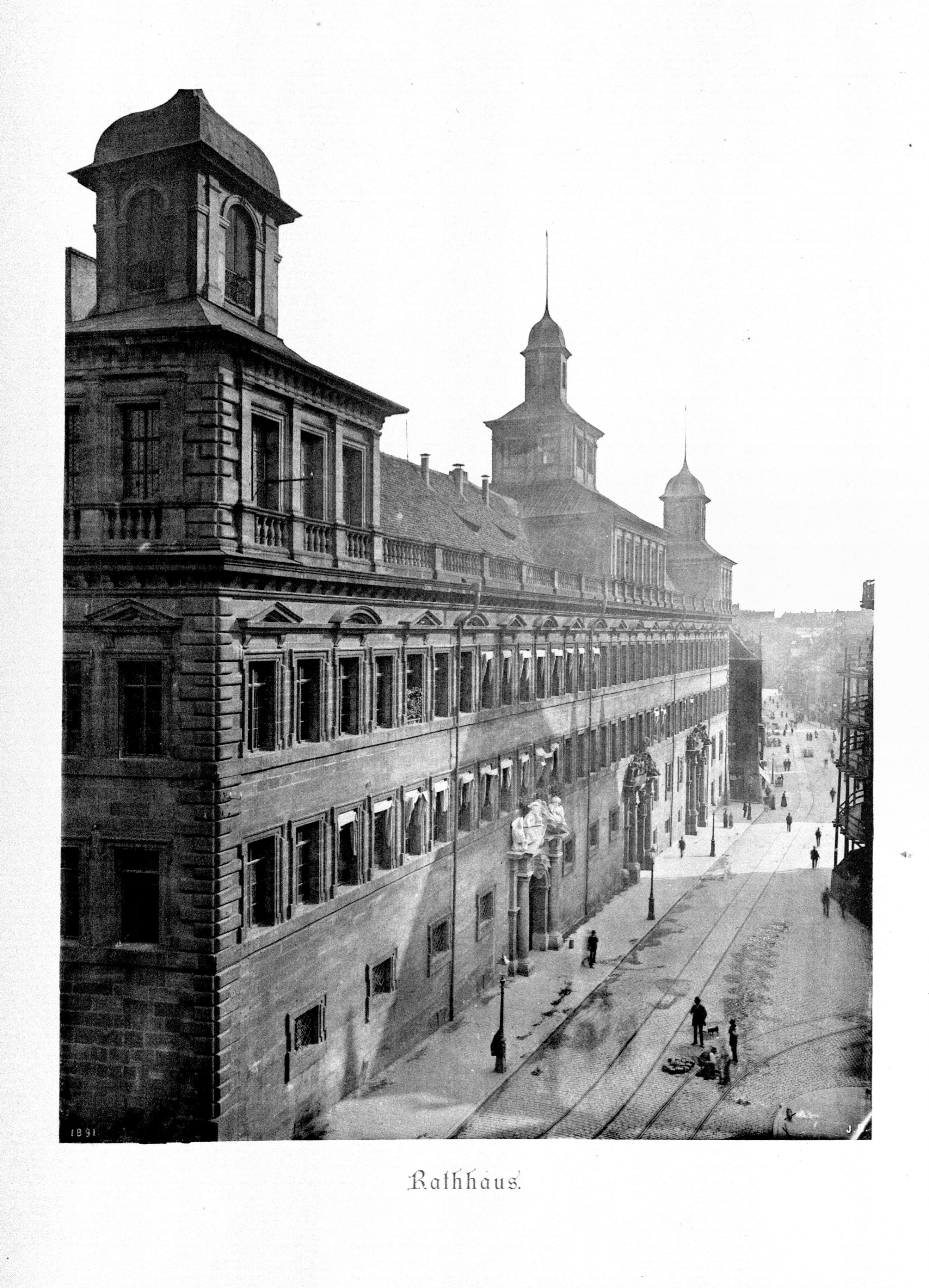 Rathhaus. aus dem Band Die Baudenkmäler der Stadt Nürnberg. Erste Nürnberger Lichtdruckanstalt & Kunstverlag Brunner. Nürnberg 1891. 2011 digitalisiert von der Ohm-Hochschulbibliothek Nürnberg. Exemplar mit der Signatur: Nürnberg, Ohm-Hochschulbibliothek -- 901/2.213 / M a